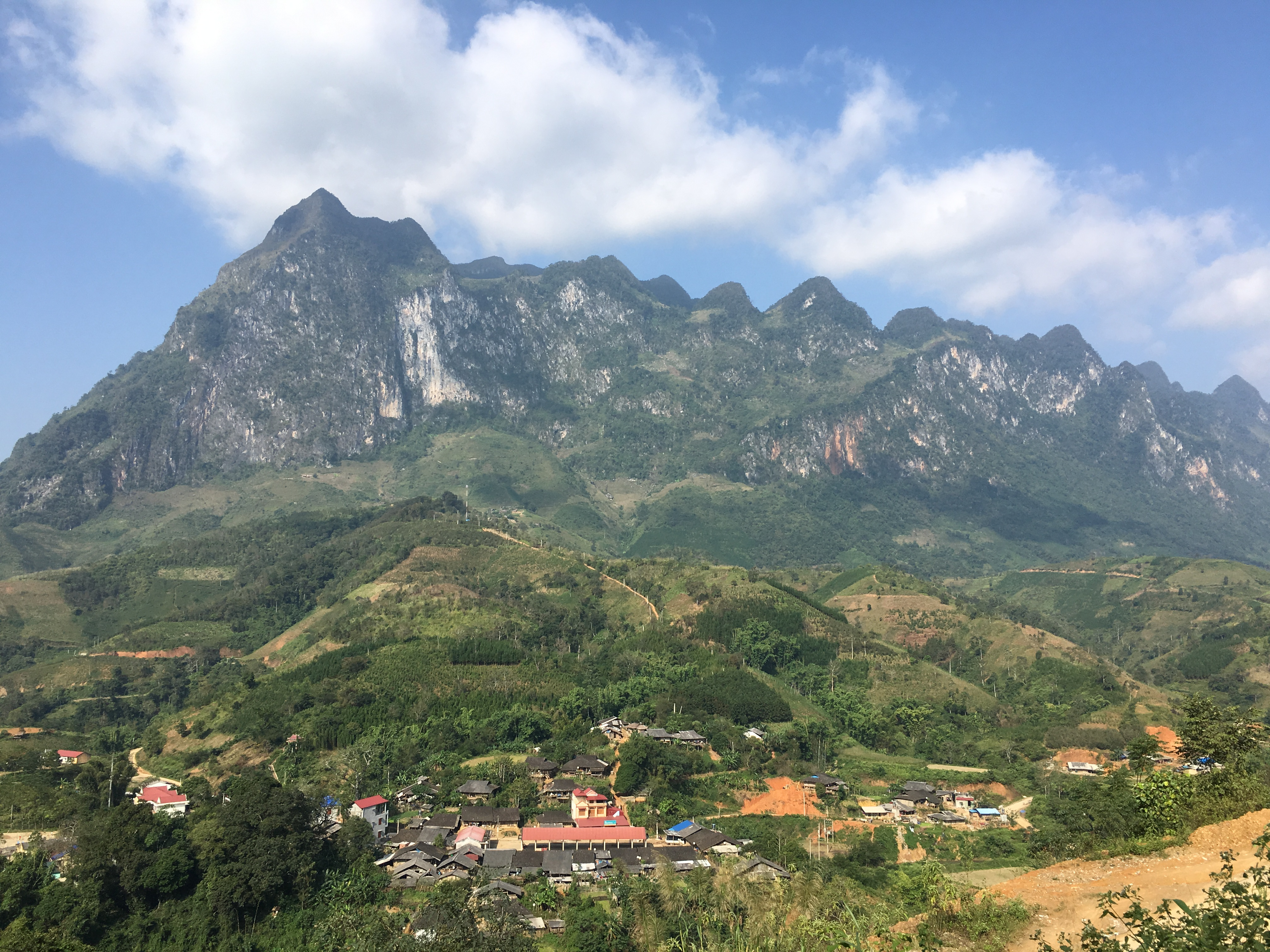 Cốc Pàng, Bảo Lạc, Cao Bằng, Vietnam